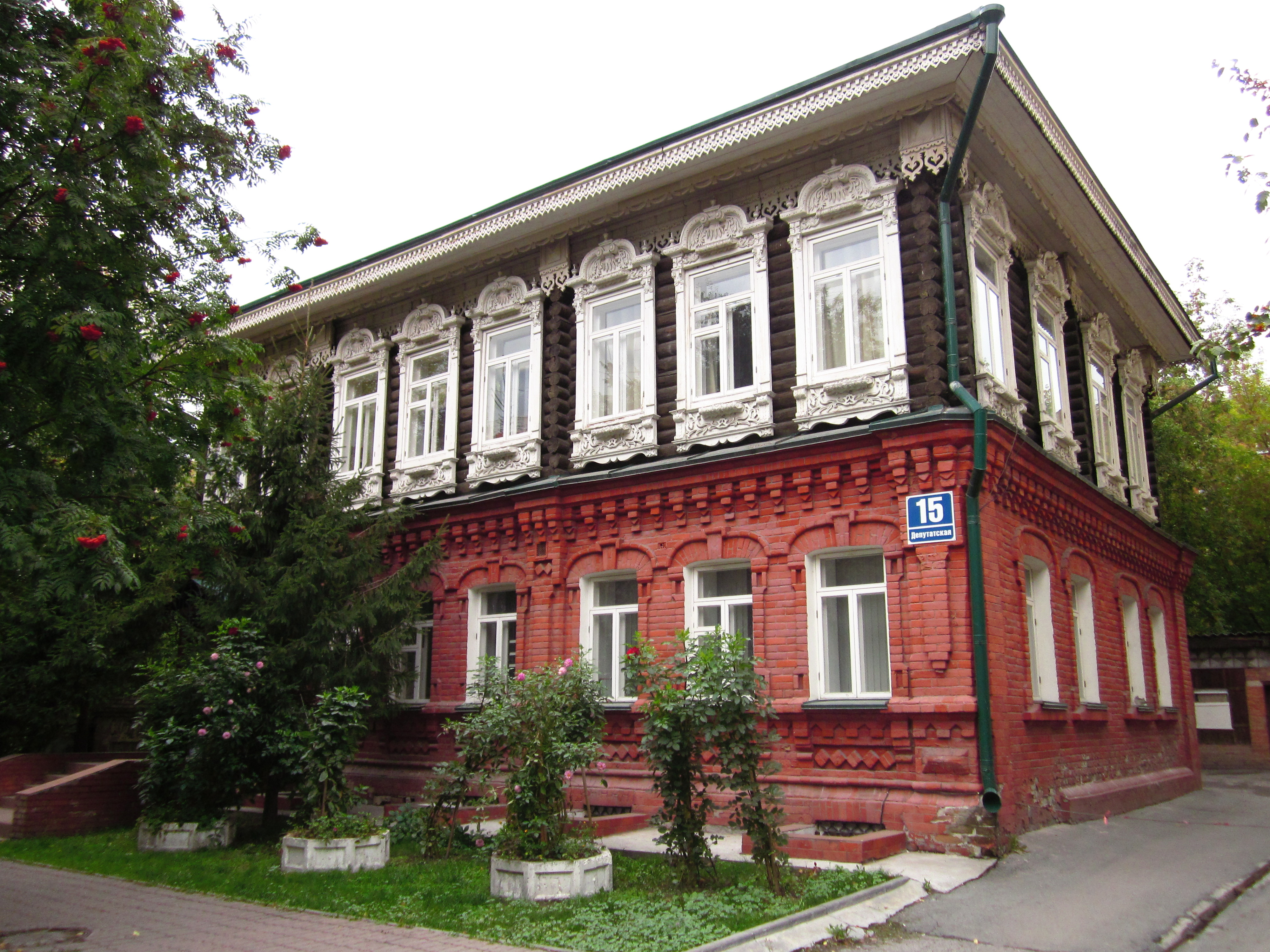 2-х этажный смешанный дом по ул. Депутатская, 15